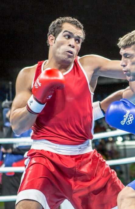 Day 3